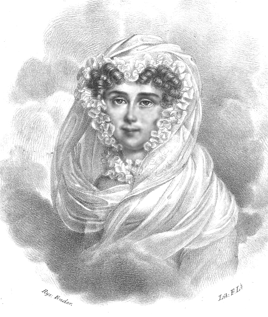 Anna z Tyszkiewiczów Potocka, secundo voto Dunin-Wąsowiczowa